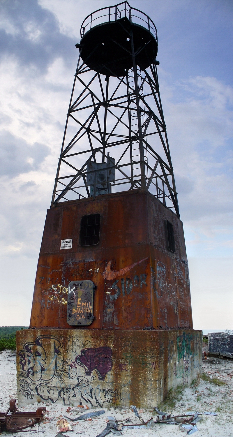 Latarnia Morska, Góra Szwedów, Mierzeja Helska, Hel, Polska